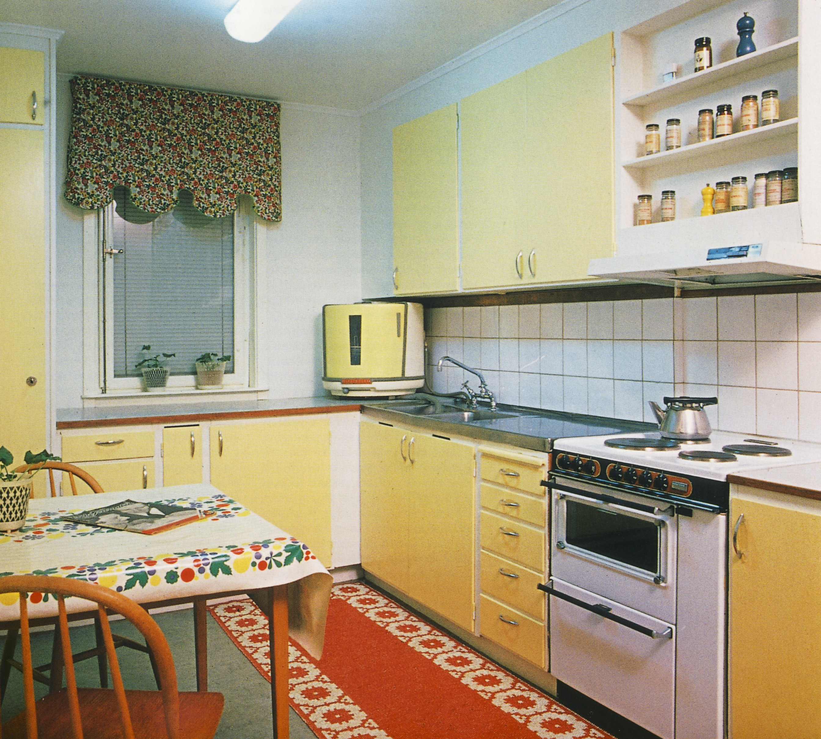 Svensk standardkök från 1950-talets slut